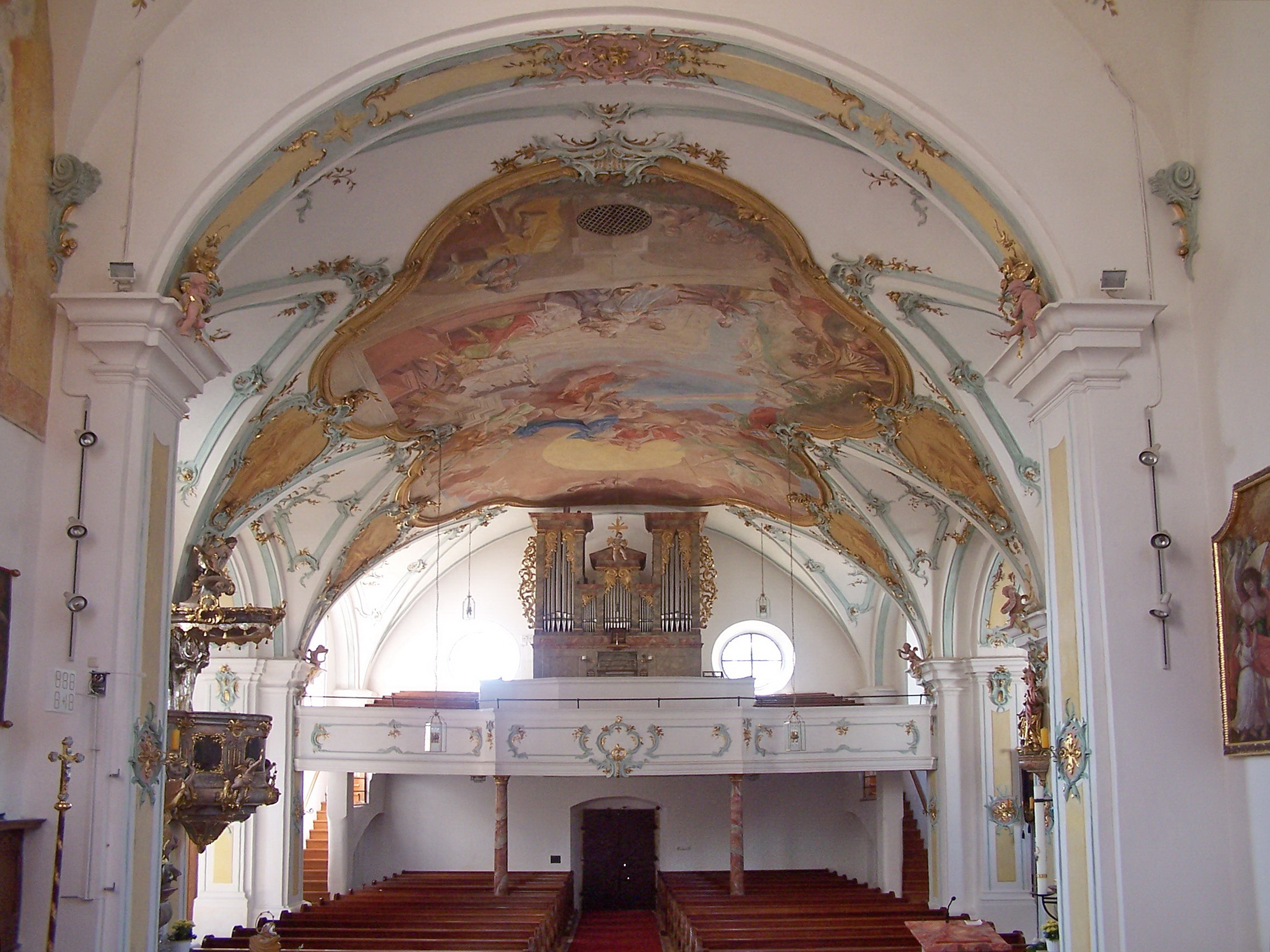 Geiselhöring, Hadersbach 28. Katholische Filialkirche Mariä Himmelfahrt. Westempore mit geschwungener Brüstung auf Pfeilern. Treppen zu beiden Seiten. Das große Deckenfresko von M. Günther aus dem Jahr 1766 hat die Aufnahme Mariens zum Thema. Die Orgel auf der Westempore mit seitlichen Akanthusranken aus dem Jahre 1843 stammt von Anton Ehrlich aus Straubing.